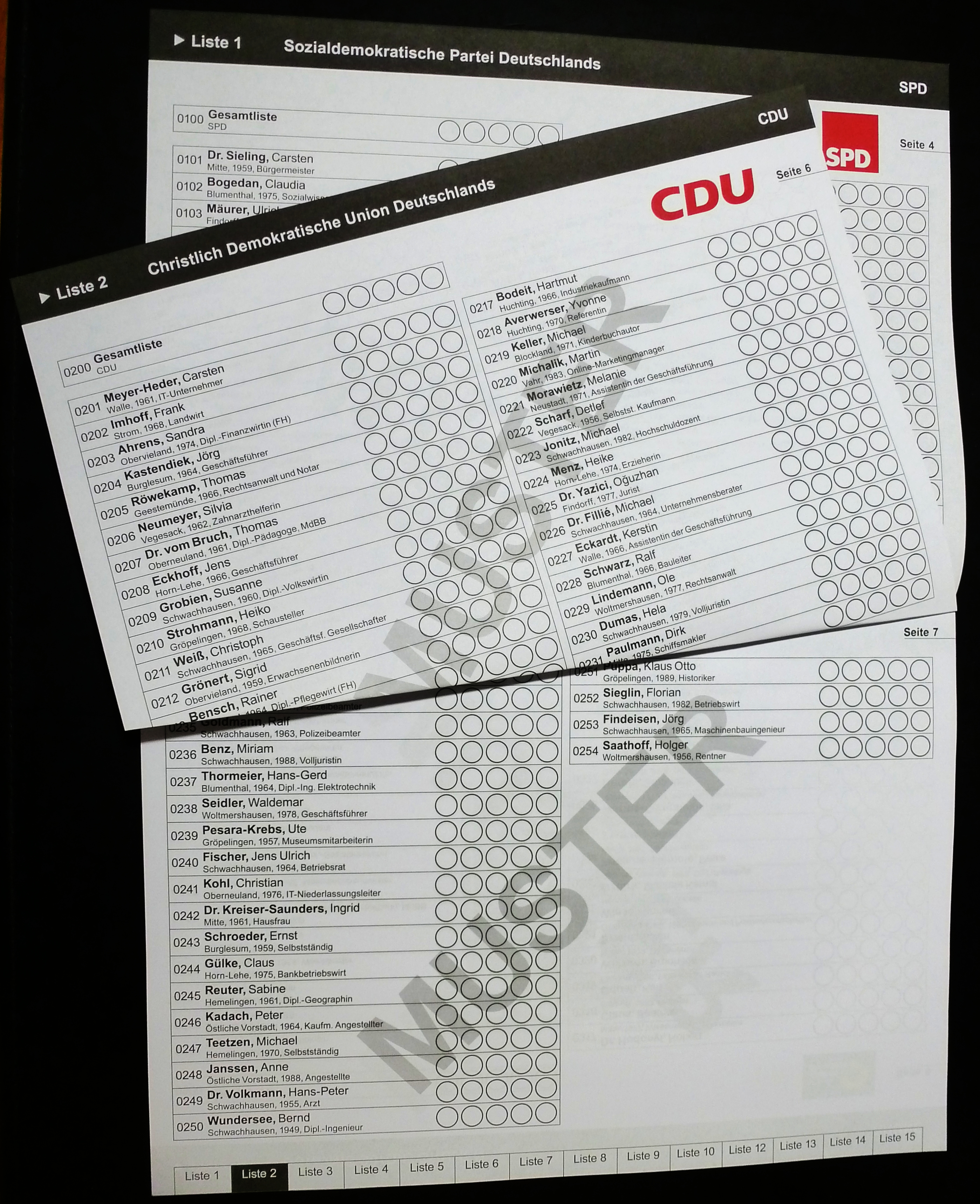 Der „Stimmzettel“ zur Bremischen Bürgerschaft 2019 ist im Wahlbereich Bremen ein DIN A4-Heft im Querformat mit 20 genutzten Seiten. Er ist in „Leichter Sprache“ verfasst und trägt zur besseren Wiedererkennung auf jeder Liste das zugehörige Logo.